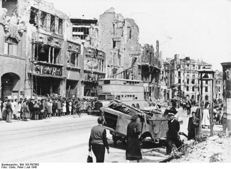 Berlin, Potsdamer, Ecke Linkstraße ADN-ZB-Illus-Cürlis Berlin im Juli 1945 Potsdamer - Ecke Linkstrasse 280-46